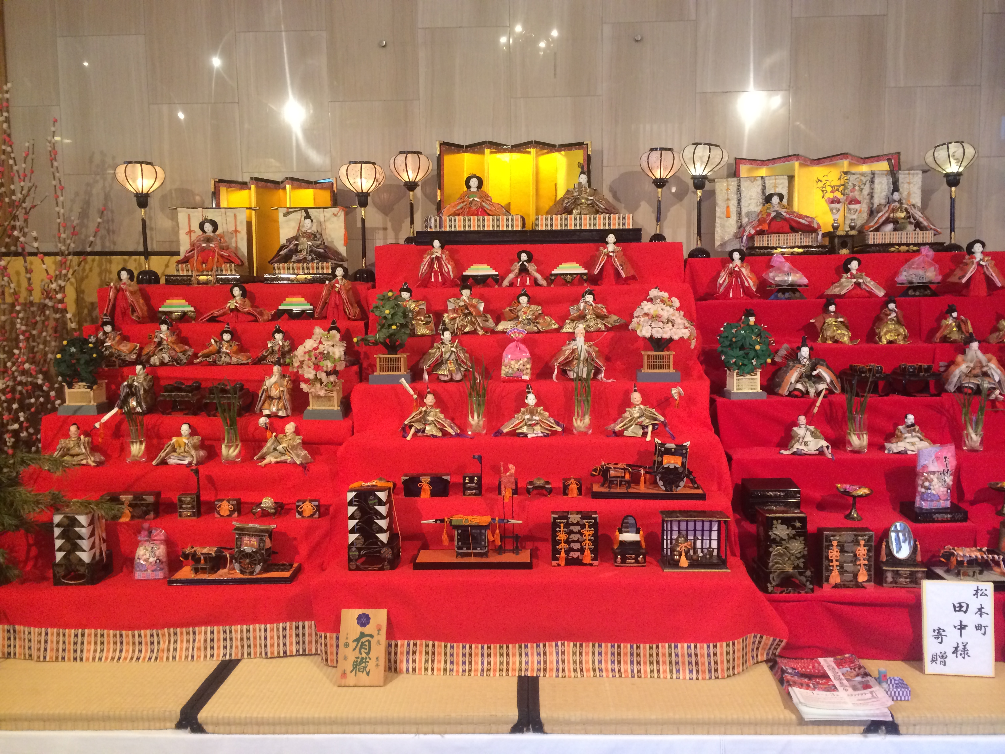 ひな祭り (飛騨高山) Hina matsuri (Hida takayama)